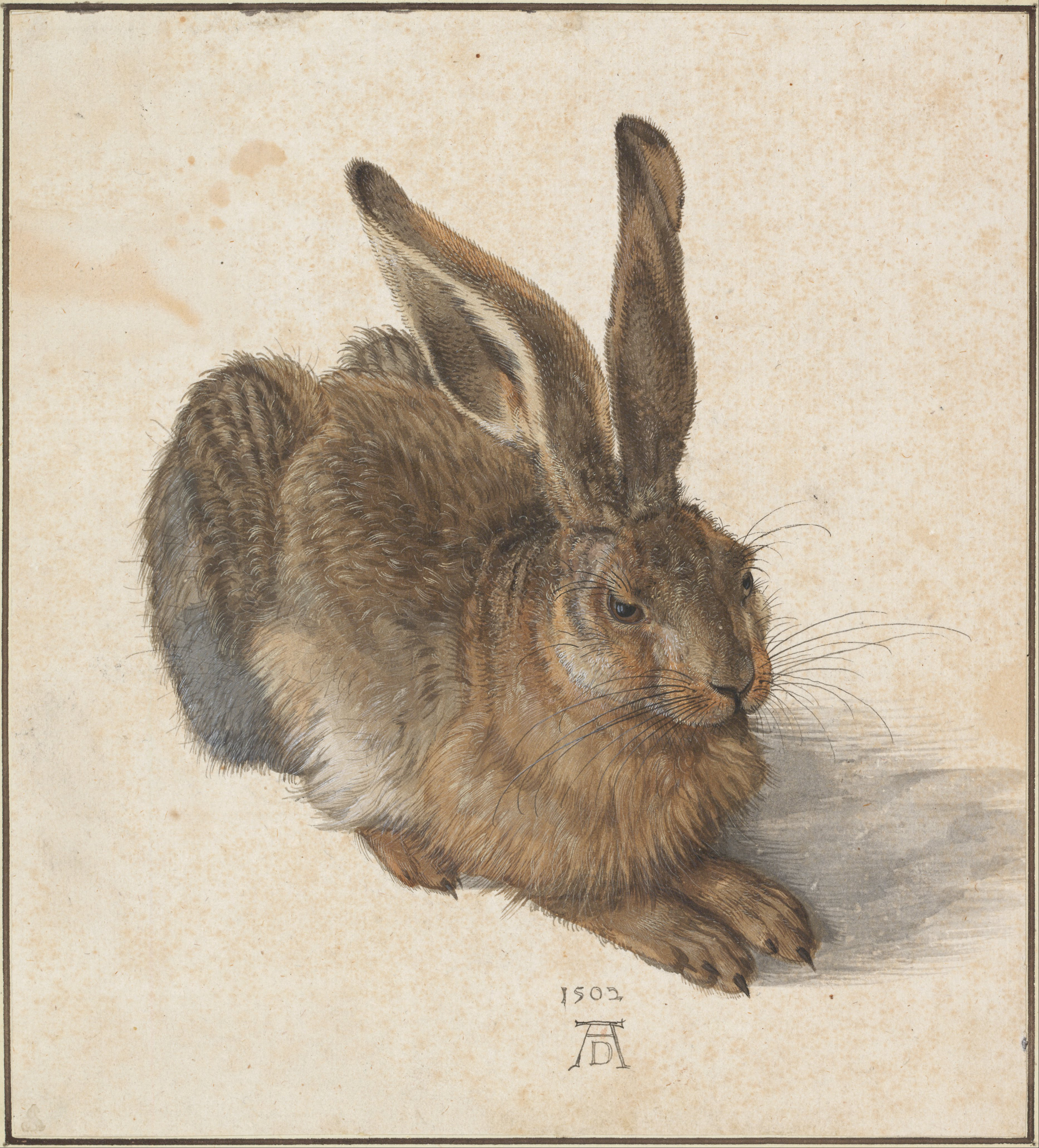 Die Werkstattfenster spiegeln sich in den Augen des Hasen.